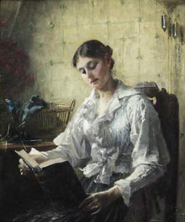 Lesendes Mädchen. Öl auf Leinwand, 37 x 31 cm; signiert